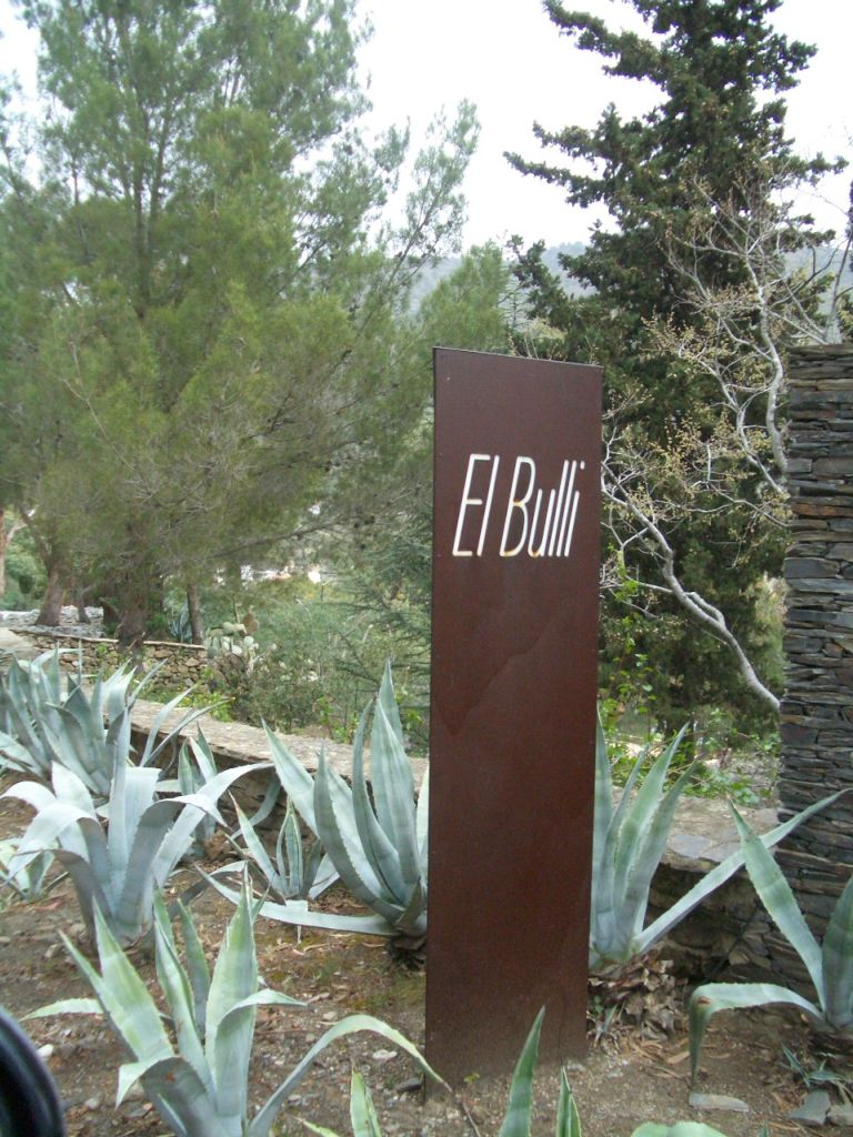 Cartell a l'entrada del restaurant El Bulli, Roses, Alt Empordà, Catalunya.